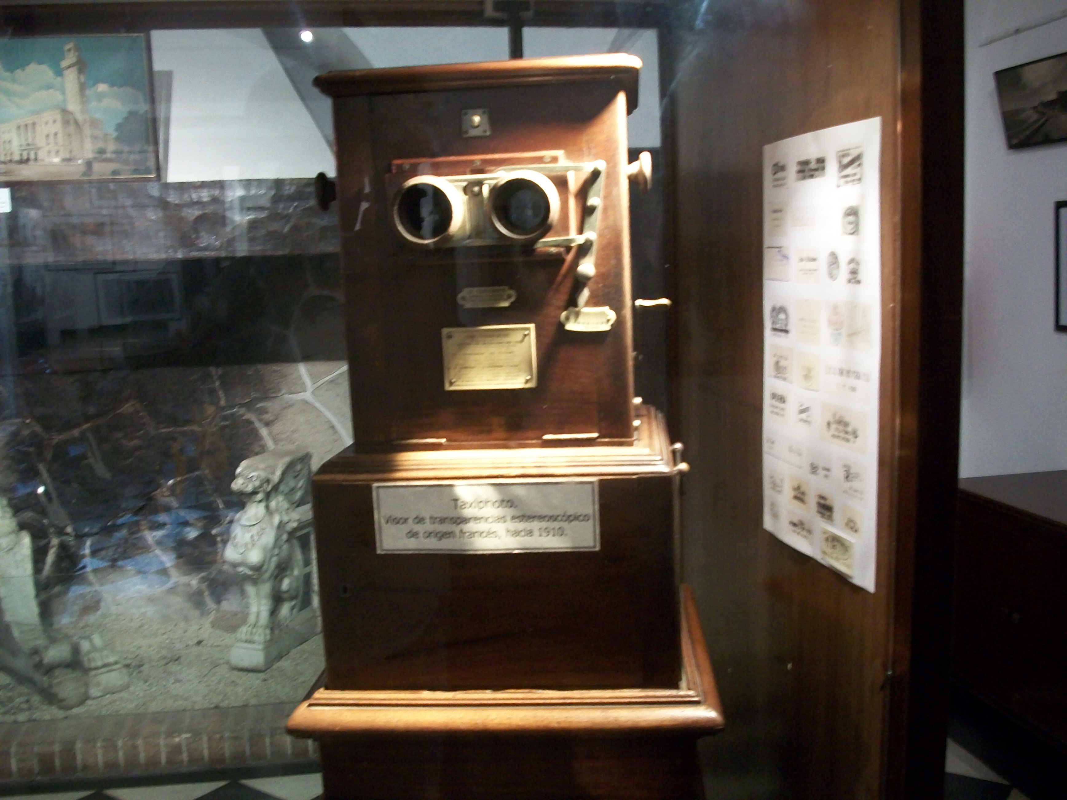 Museo Hist¾rico Municipal Don Rodolfo T. Barili, Mar del Plata, Argentina